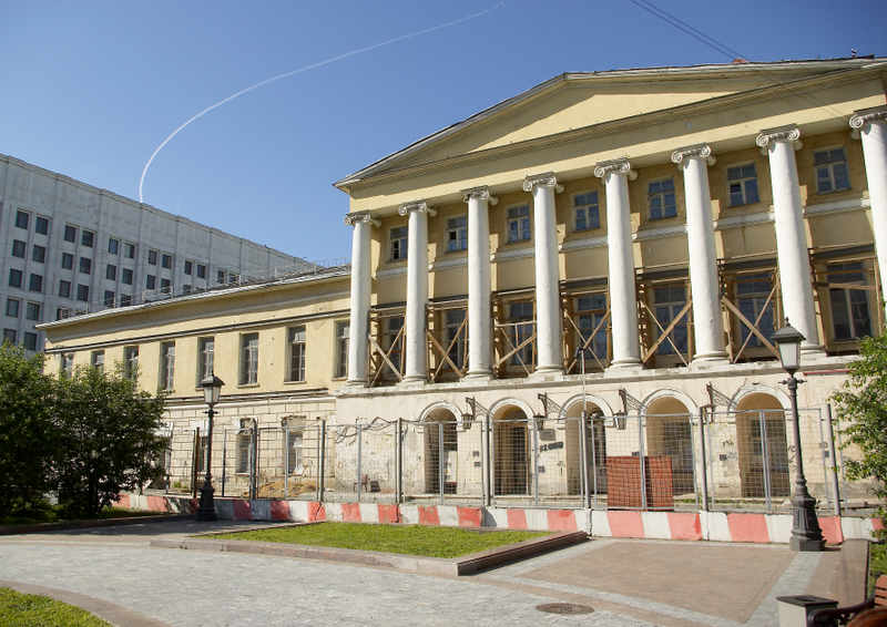 Московская средняя специальная музыкальная школа им.Гнесиных